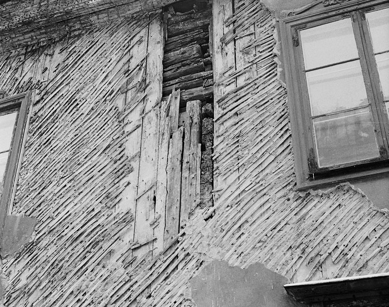 Tjärhovsgatan 32. Del av fasaden visar en äldre form av revetering.